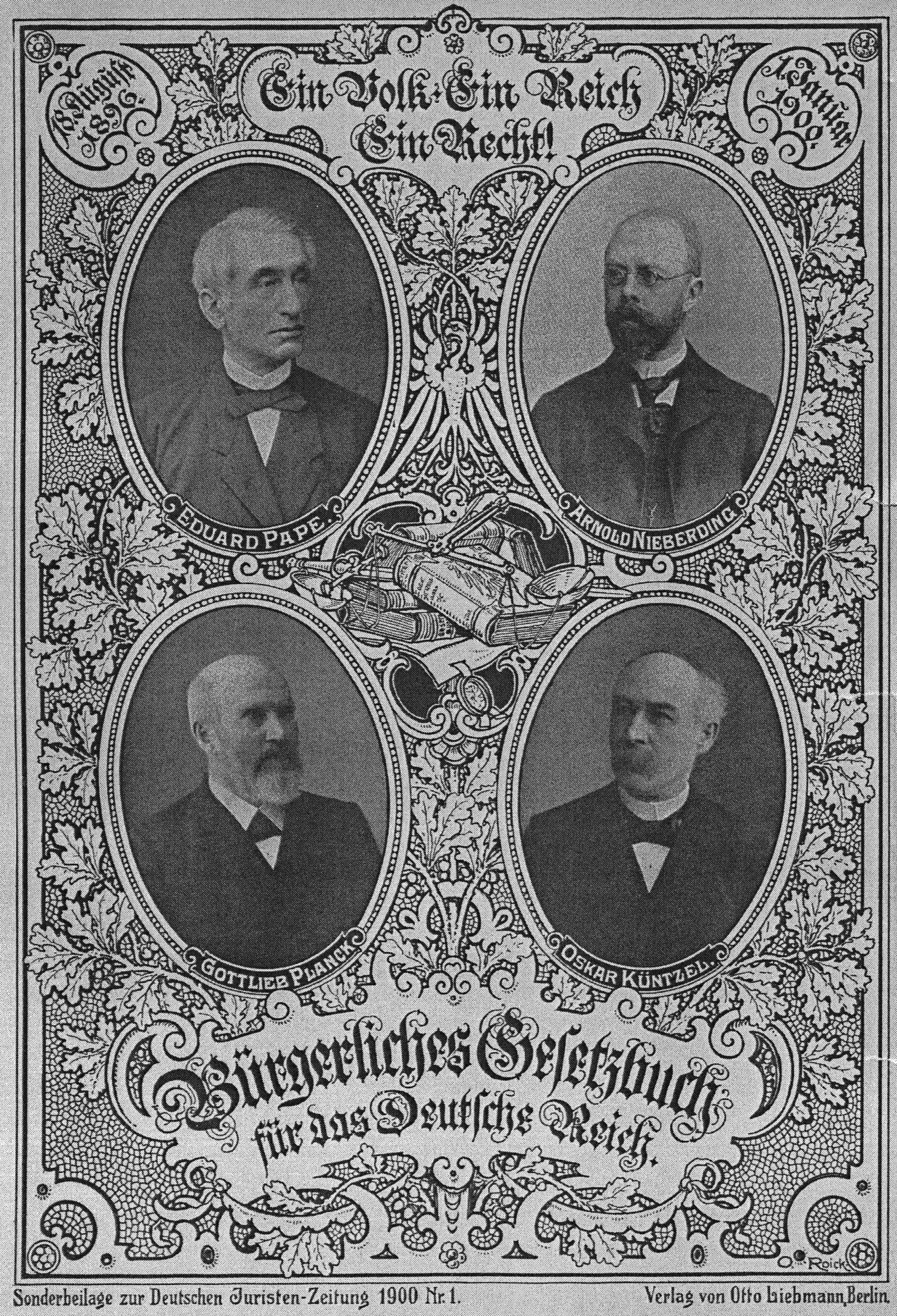 Портрет Э. Папе, А. Нибердинга, Г. Планка, О. Кюнцеля